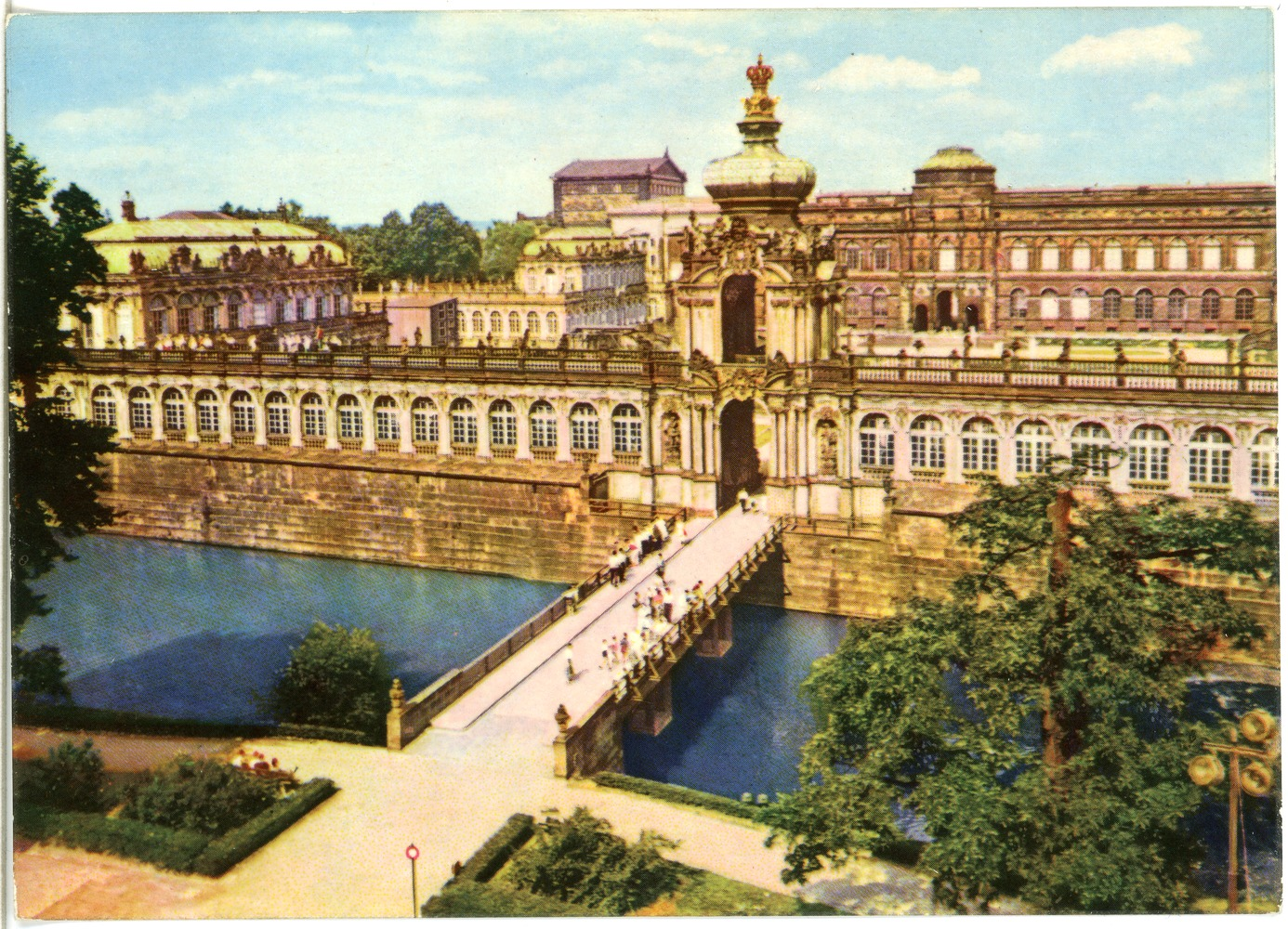 Dresden; Zwinger, brücke This postcard is from publisher Brück & Sohn in Meißen ( postcard has a unique number 29801 and is available in a higher resolution at the publisher. This images was uploaded in a cooperation project between Wikipedians and the publisher.